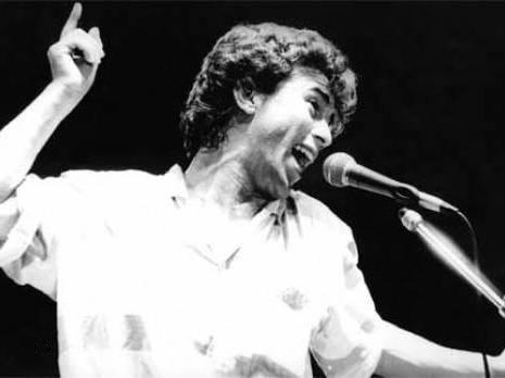 Djilali Amarna de son vrai nom Djilali Razkallah (1962-2010), chanteur algérien du groupe Raïna Raï